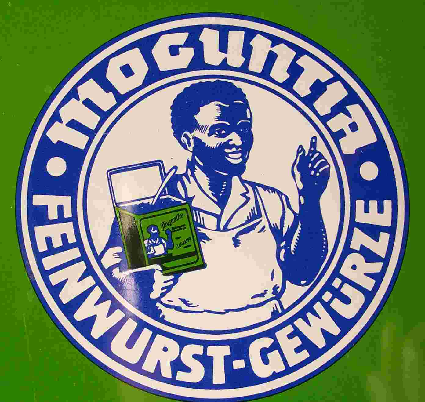 Nostalgie Dose für Gewürze von den Moguntia-Werken in Mainz. Hier das damalige Logo.